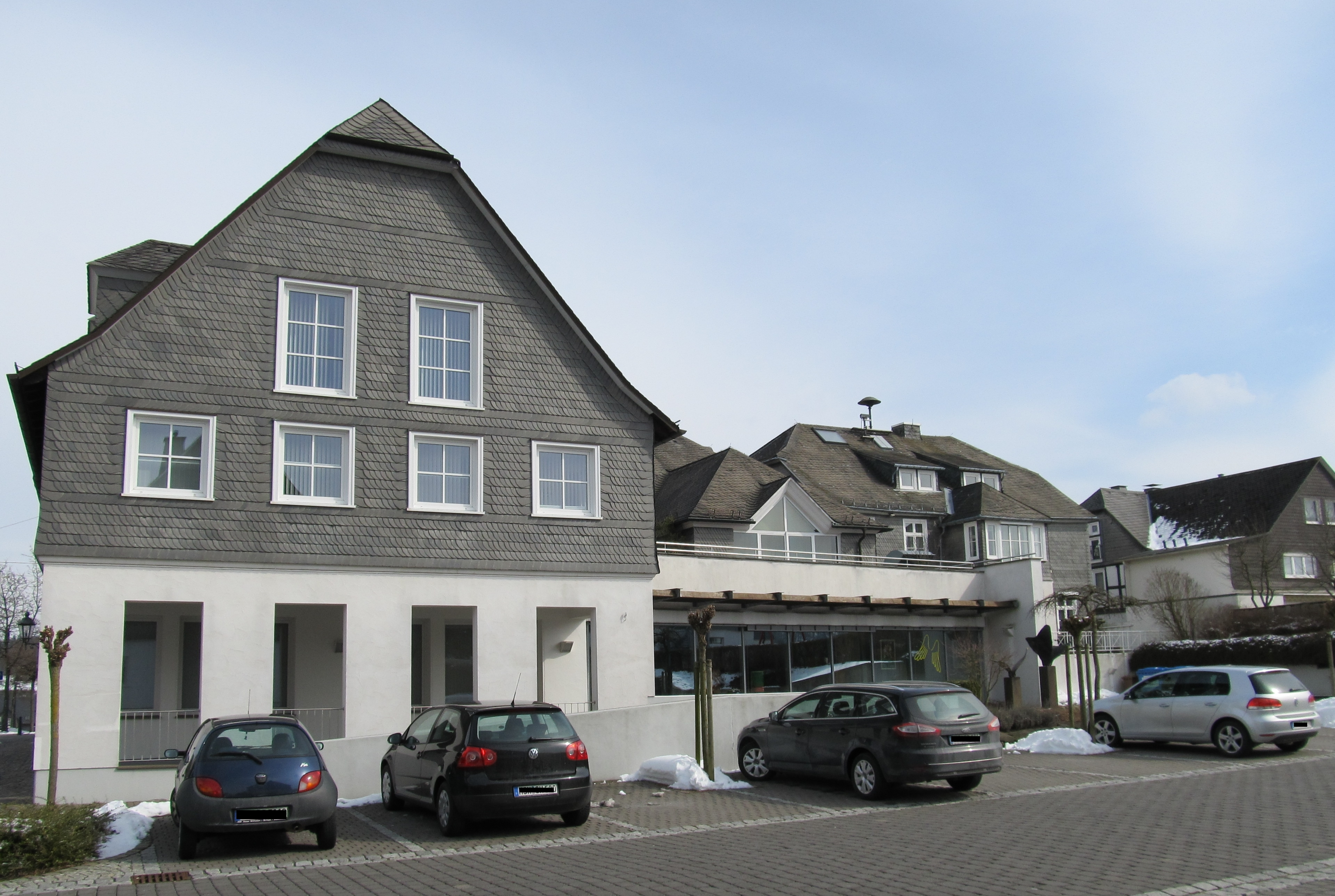 Stadtsparkasse Schmallenberg, Rückseite Hauptgeschäftsstelle (Germany)